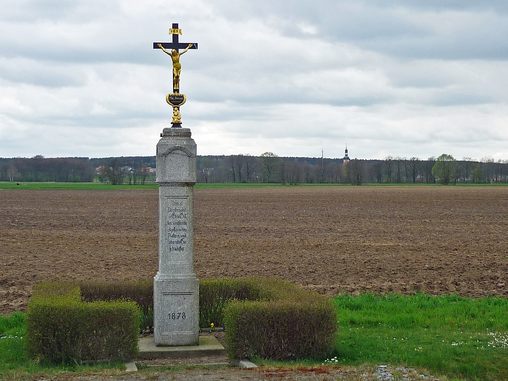 Wegkreuz in Naußlitz (Ralbitz-Rosenthal) an der Straße nach Ralbitz (mit deutscher Beschriftung) Hornjoserbsce: Swjaty křiž při puću mjez Nowoslicami a Ralbicami (z němskim napismom)